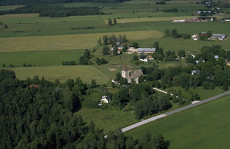 Motiv: Guldrupe kyrka Nyckelord: Flygbilder, Riksintressen Kategori: Miljöer, OdlingslandskapGuldrupe kyrka